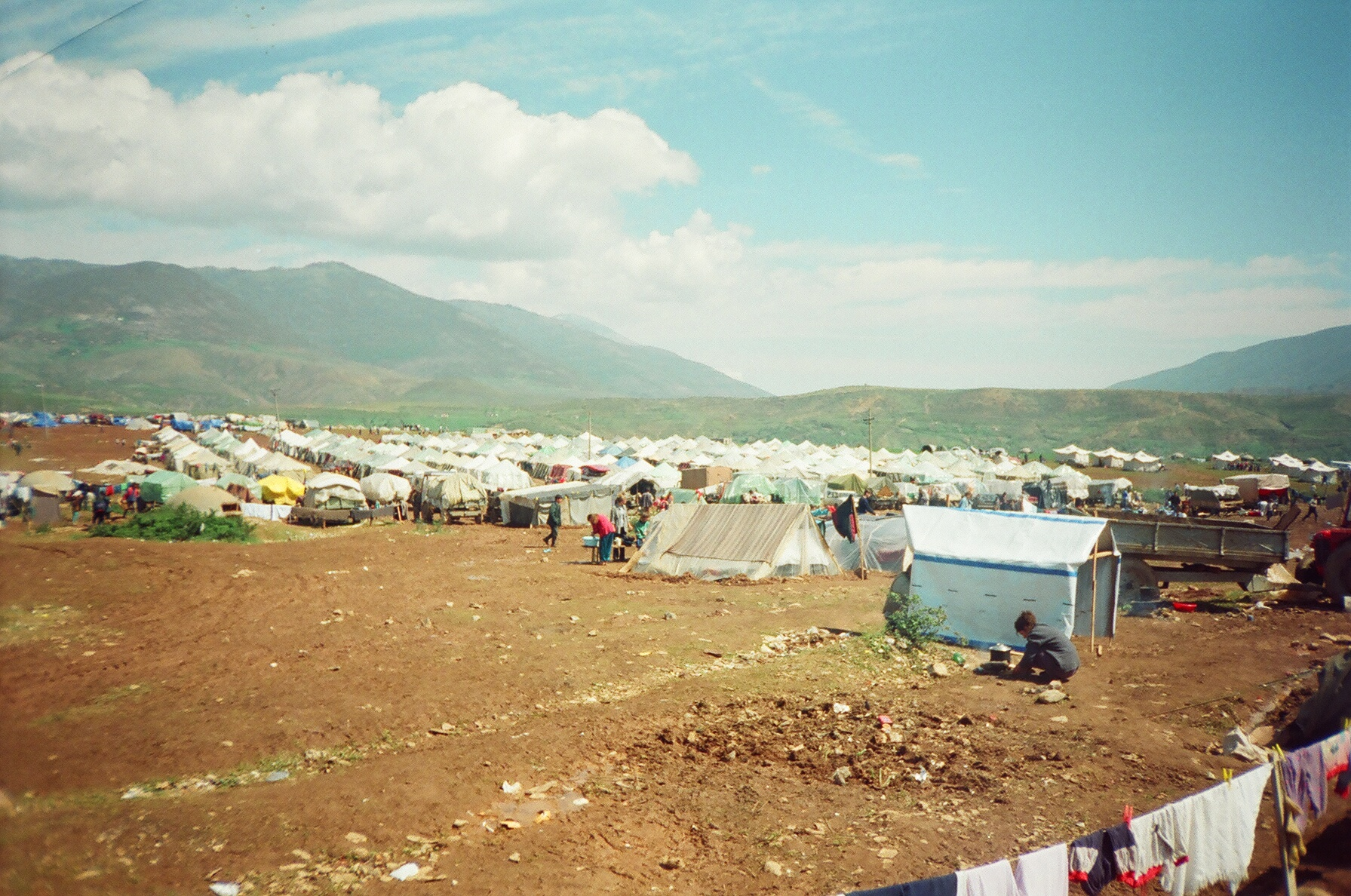 Kampi i Kosovareve gjate Eksodit 99